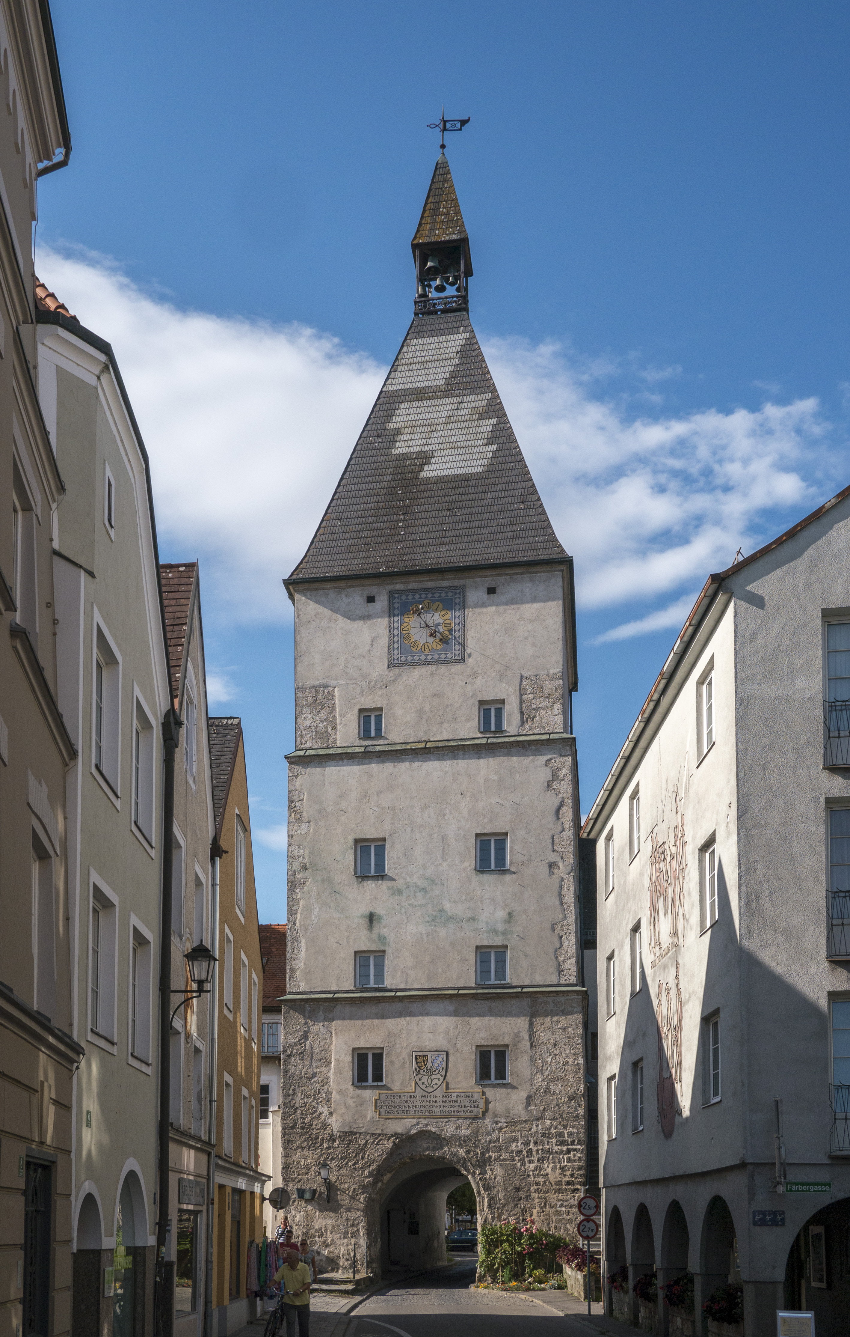 Stadttorturm, Salzburger Tor